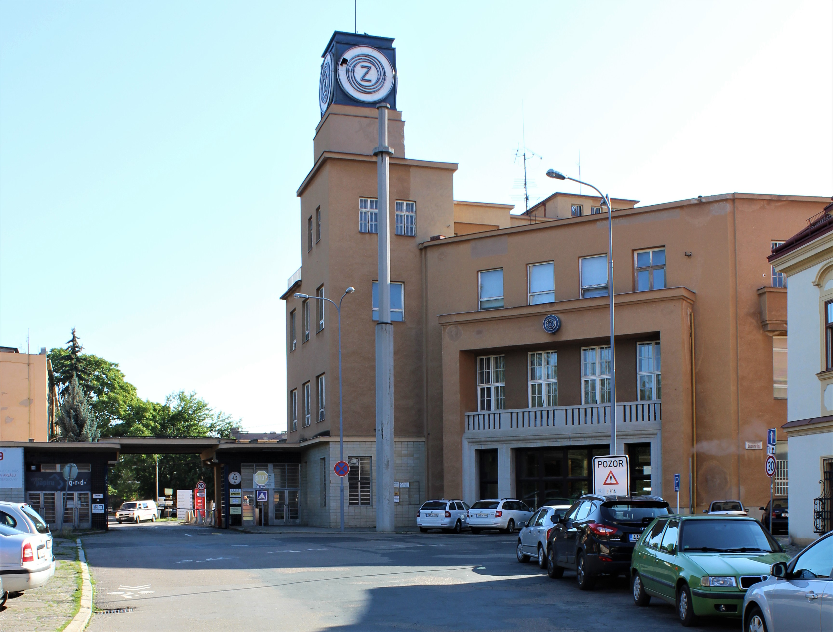 Ředitelství Zbrojovky Brno Lazaretní